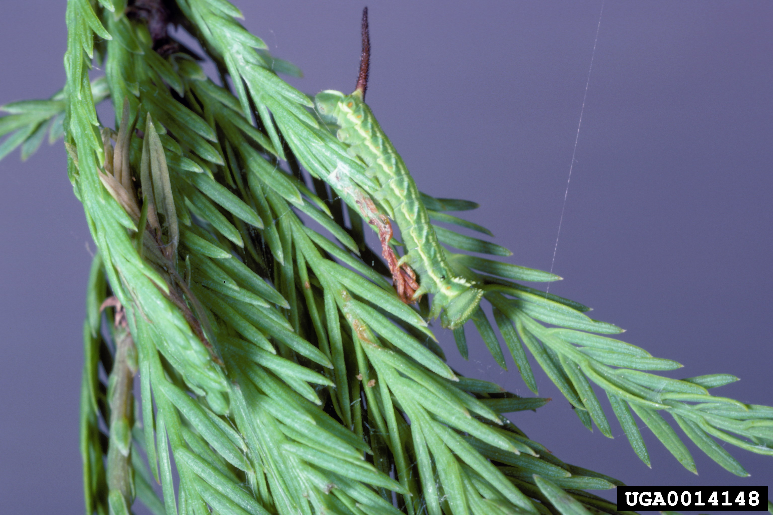 Isoparce cupressi, larva, on Taxodium distichum (L.)